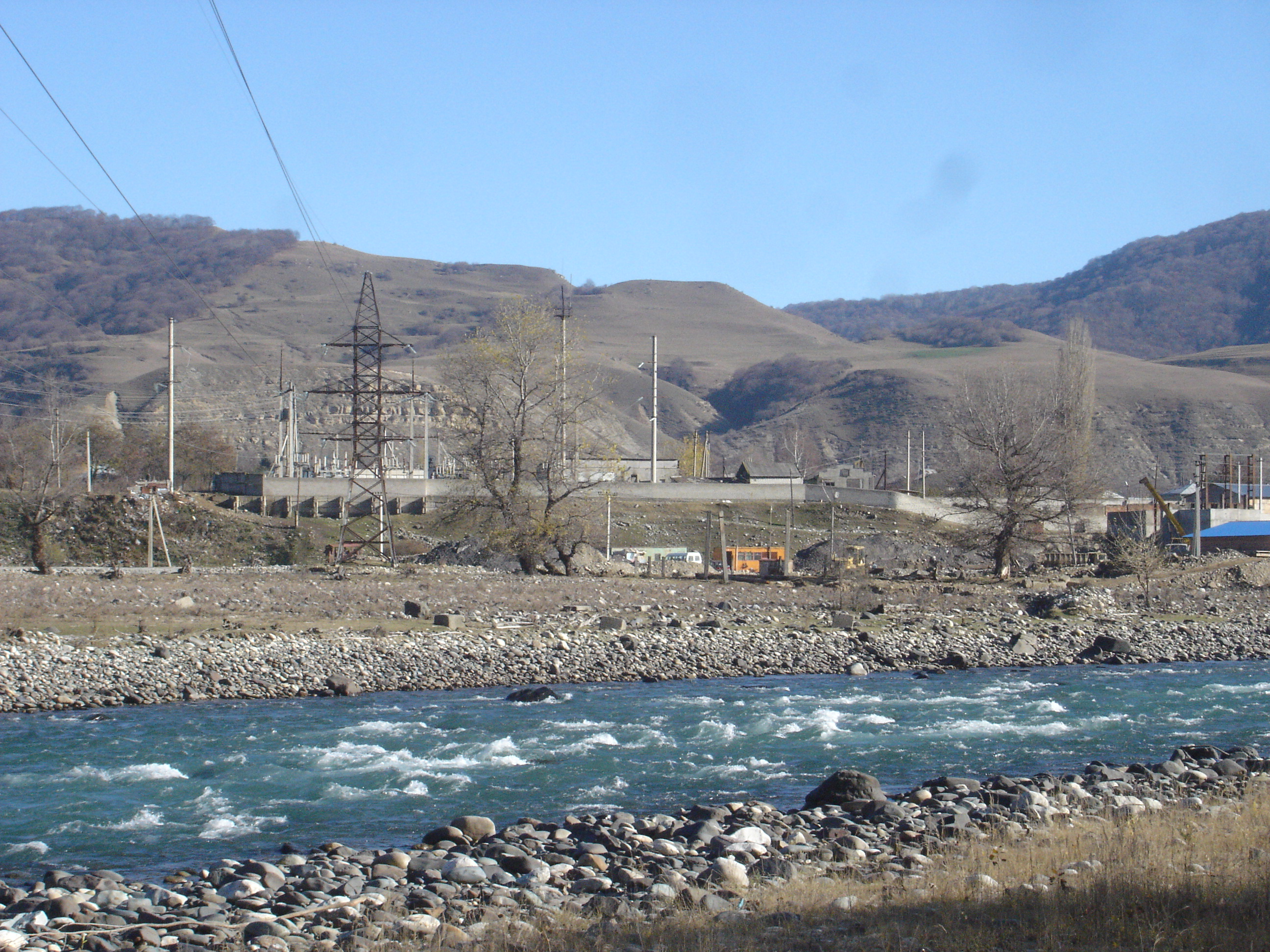 Карачаевск, республика Карачаево-Черкессия, Россия.